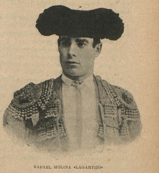 Rafael Molina, "Lagartijo". La Fiesta Nacional, 18 de agosto de 1904